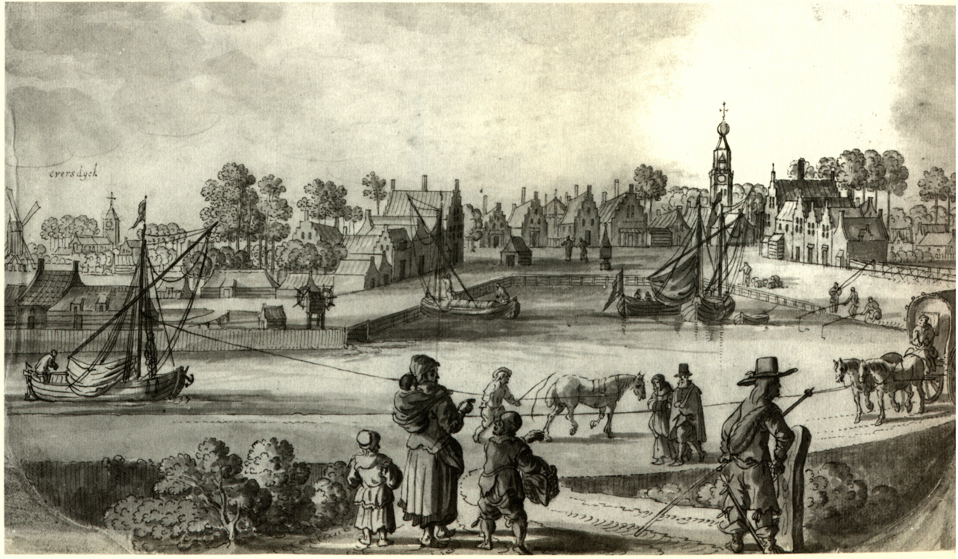 Prent van Biezelinge; voorbeeld voor de kopergravure in de "Speculum Zelandiæ"